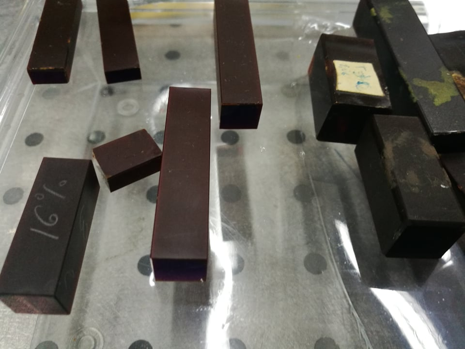 Moduliatoriai skirtingu koncentraciju. (LiFi